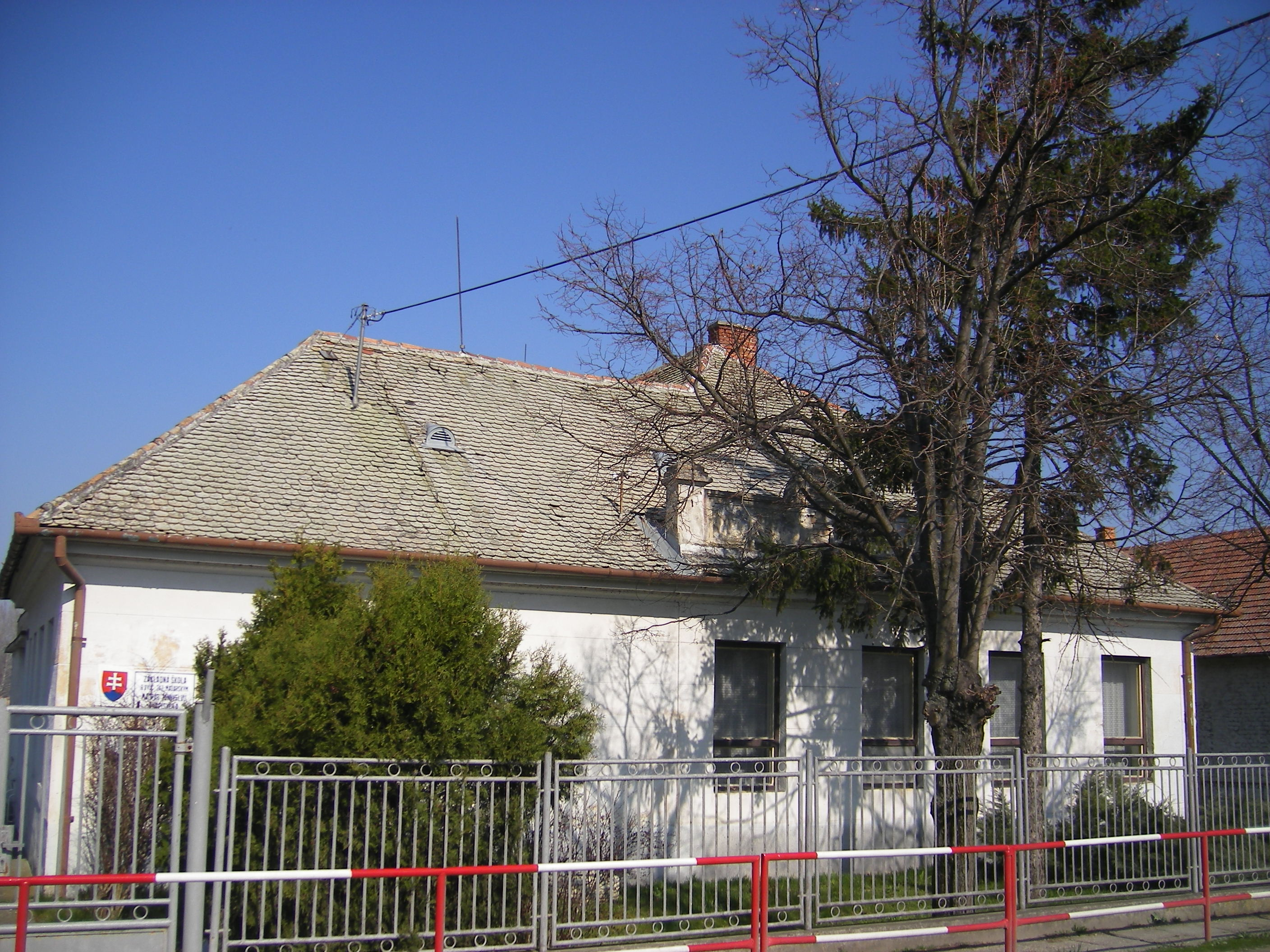 Komáromfüss - volt alapiskola